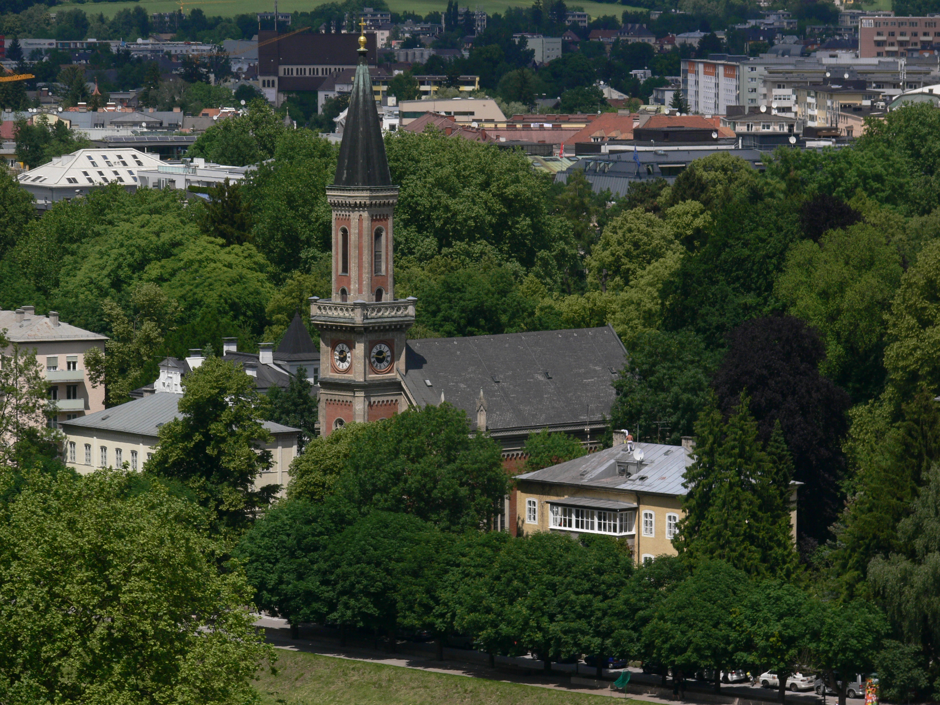 Salzburg, Aussicht vom Mönchsberg Christuskirche